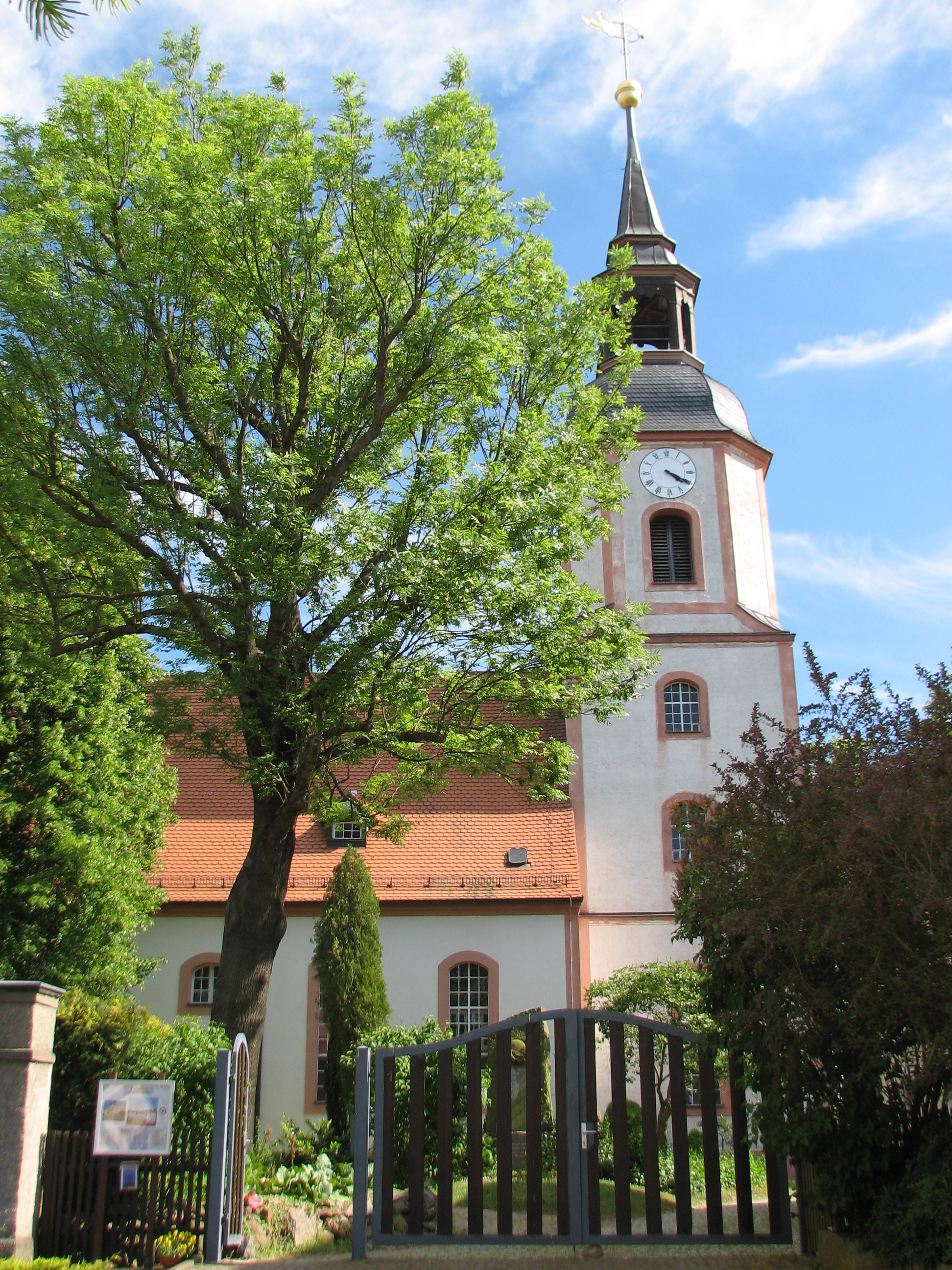 Kirche Gerichshain Eingang